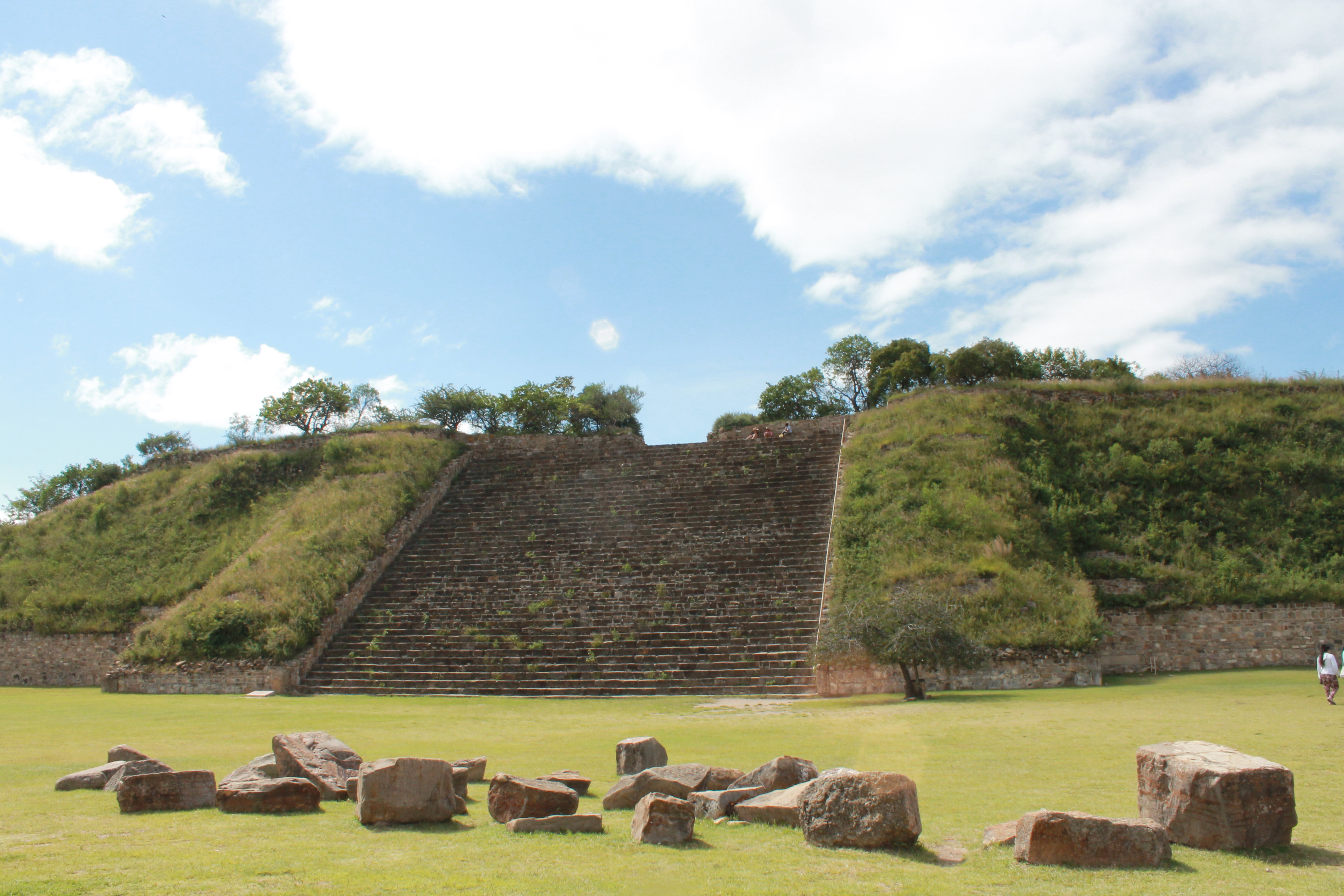 Se aprecia la escalinata que conduce a la Plataforma Sur de Monte Albán.